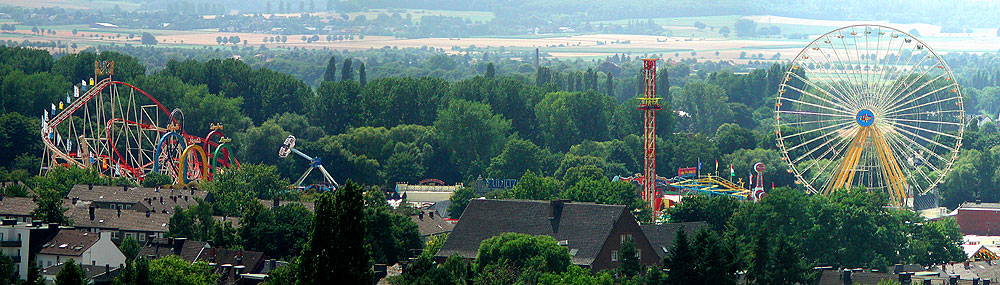 Die Dürener Annakirmes 2001 aus der Vogelperspektive